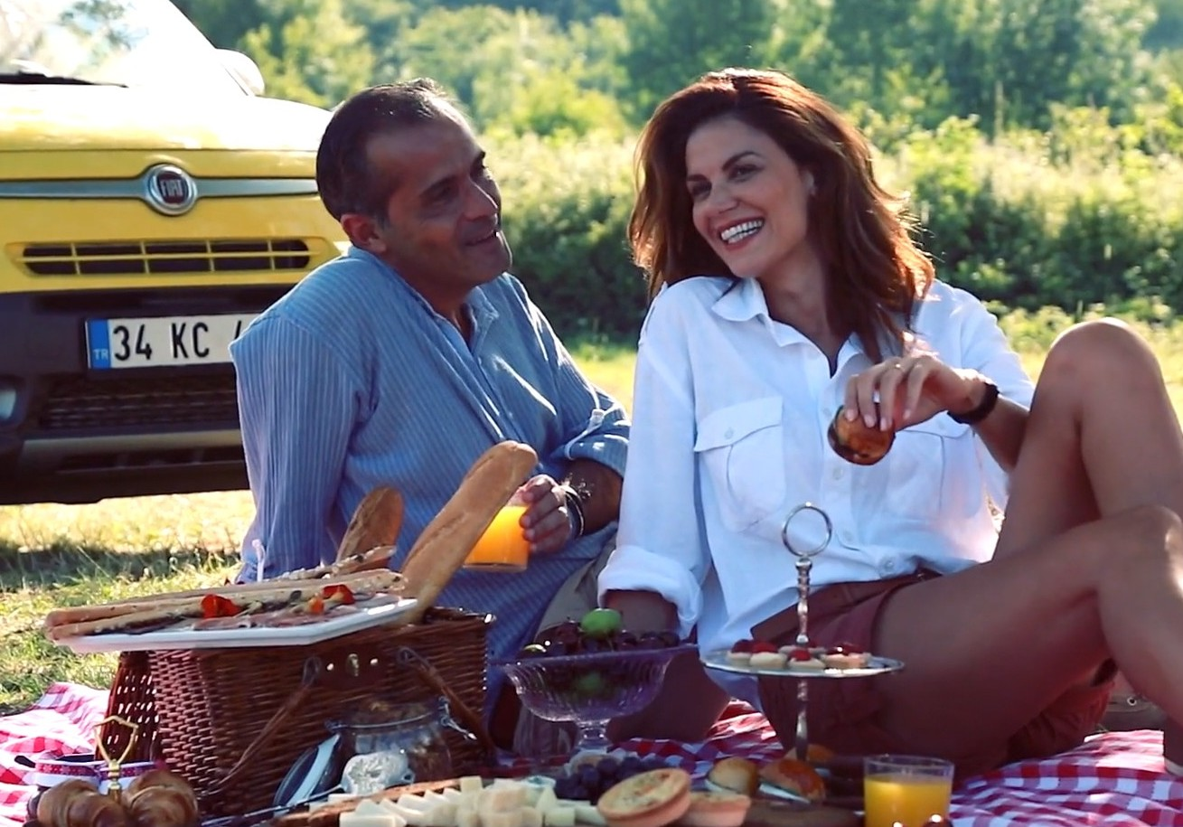 2013 yılında Tülin Şahin'in de oynadığı reklam filminden bir kare